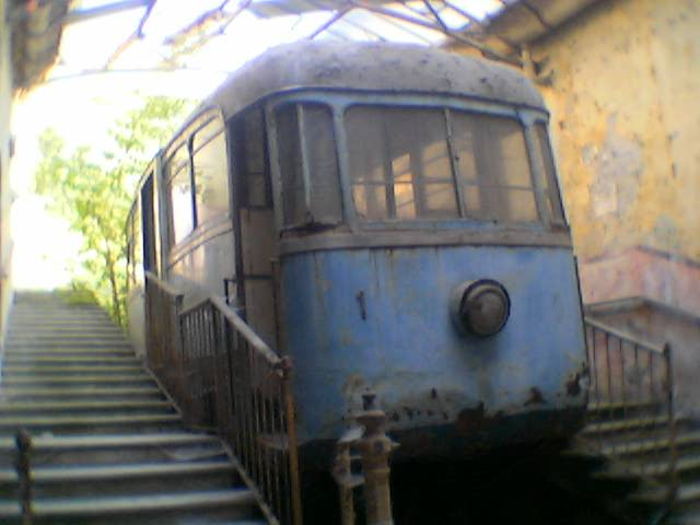 Vecchia vettura della funicolare nella Stazione di Breo (Agosto 2004).